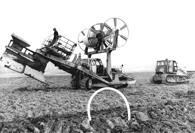 Römhild, Verlegung von Drainage ADN-ZB Schaar 4.5.88 Bez. Suhl: Melioration. Zuverlässige Partner bei der Intensivierung landwirtschaftlicher Nutzflächen zwischen Rennsteig und Rhön sind die rund 300 Beschäftigten der Melioratinsbetriebe und -genossenschaften. Zu ihren Vorhaben für 1988 gehört die Be- und Entwässerung von mehr als 1400 Hektar landwirtschaftlicher Nutzfläche, der Straßen- und Wegebau sowie der weitere Ausbau von Vorflutern. Auf Feldern der LPG Römhild verlegt ein Meliomat derzeit Plastdrainrohre.